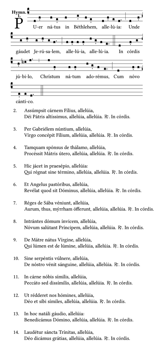 Puer natus in Bethlehem, hymnus mediaevalis in nativitate Domini